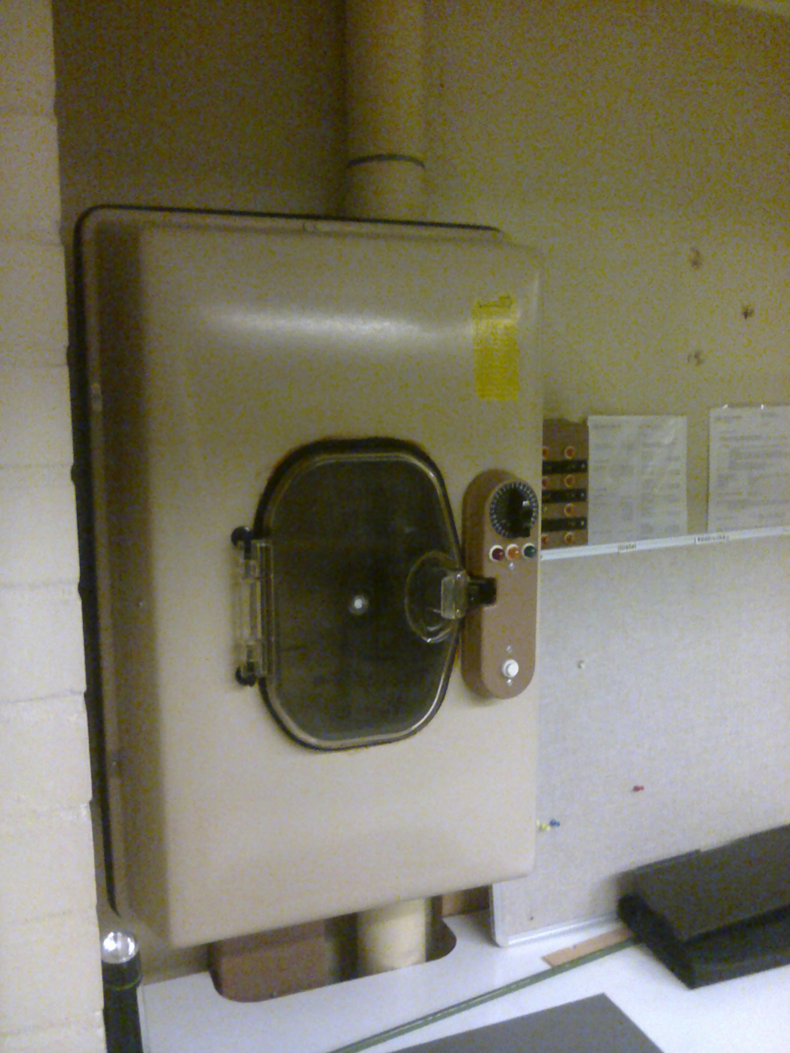 putkipostilaite kansallisarkistossa